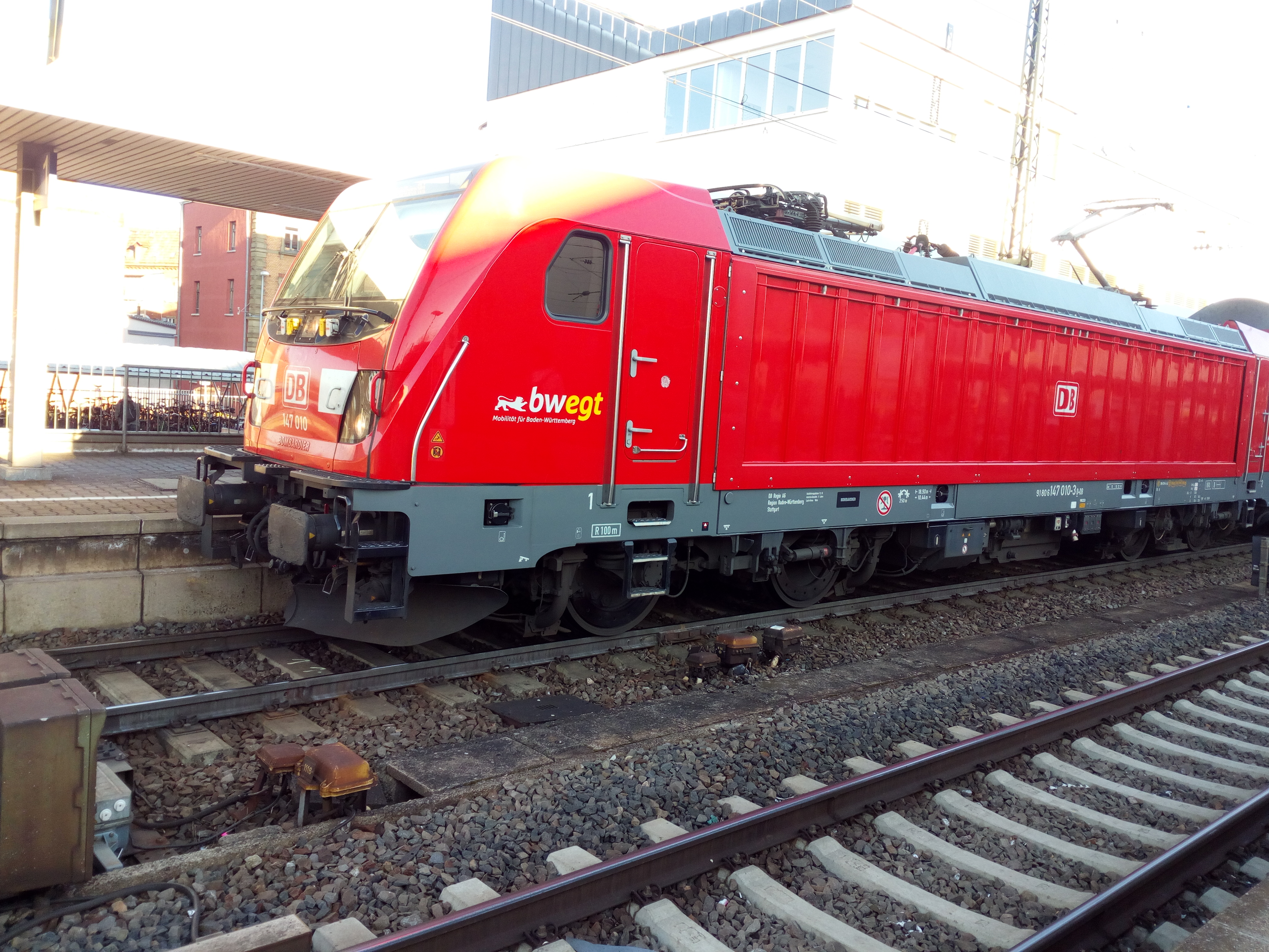 Auch auf Lokomotiven der DB Regio wurde das bwegt-Logo angebracht, die verkehrsrote Lackierung wurde jedoch behalten.